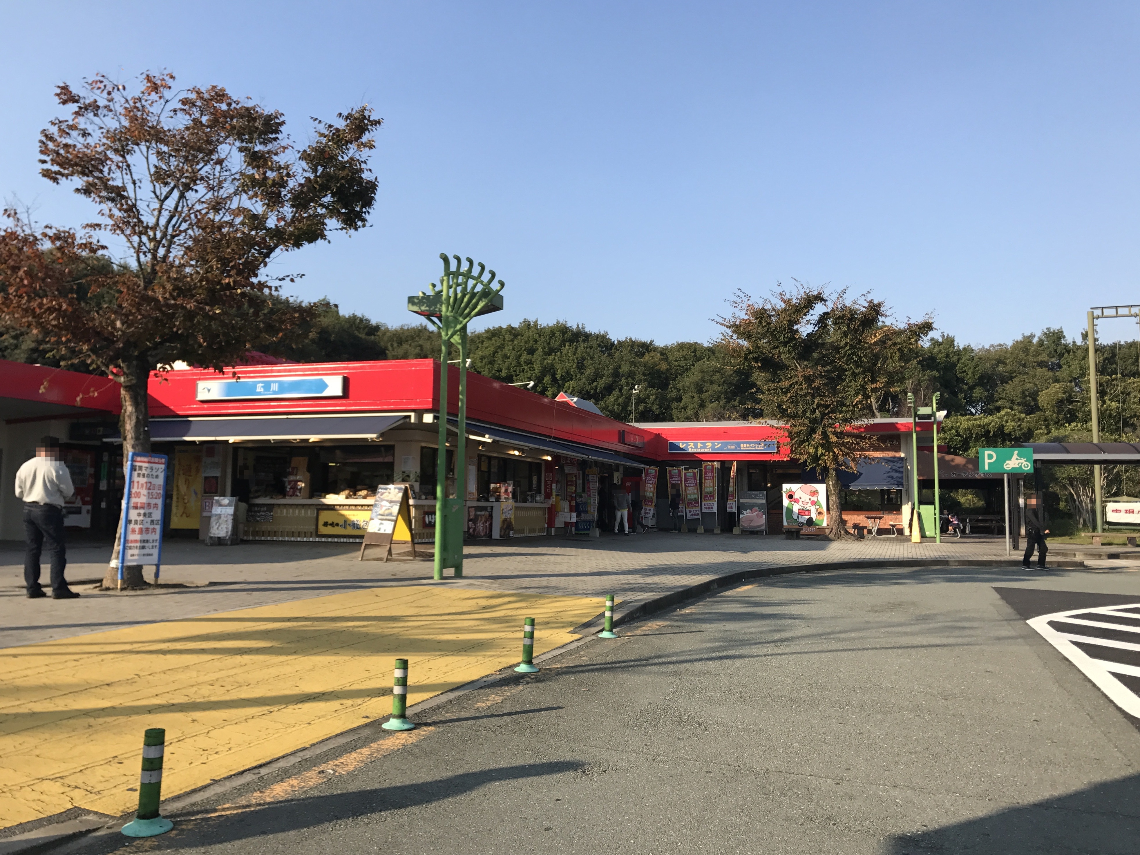 九州自動車道広川SA上り線